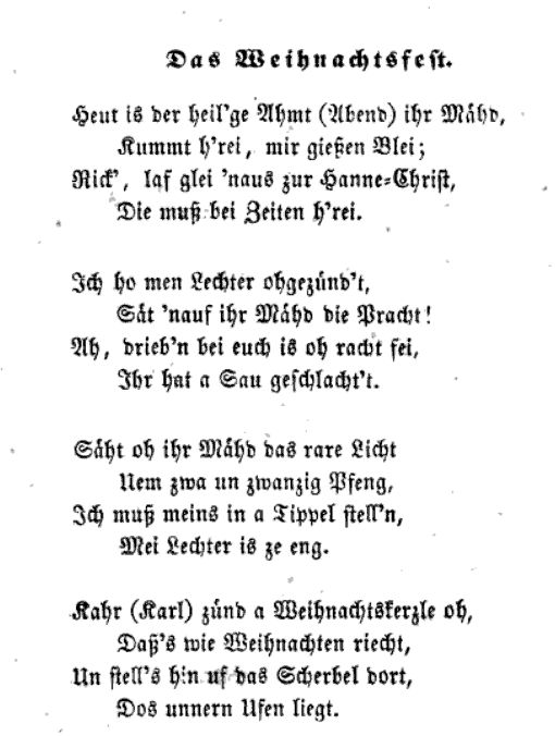 Johann Traugott Lindner berichtete im Jahr 1848 in Wanderungen durch die interessantesten Gegenden des Sächsischen Obererzgebirges über das Heiligobndlied aus dem Ort Großpöhla und druckt 14 Strophen ab. Johann Traugott Lindner: Wanderungen durch die interessantesten Gegenden des Sächsischen Obererzgebirges, Rudolph und Dieterici Verlag, Annaberg 1848 Digitalisat